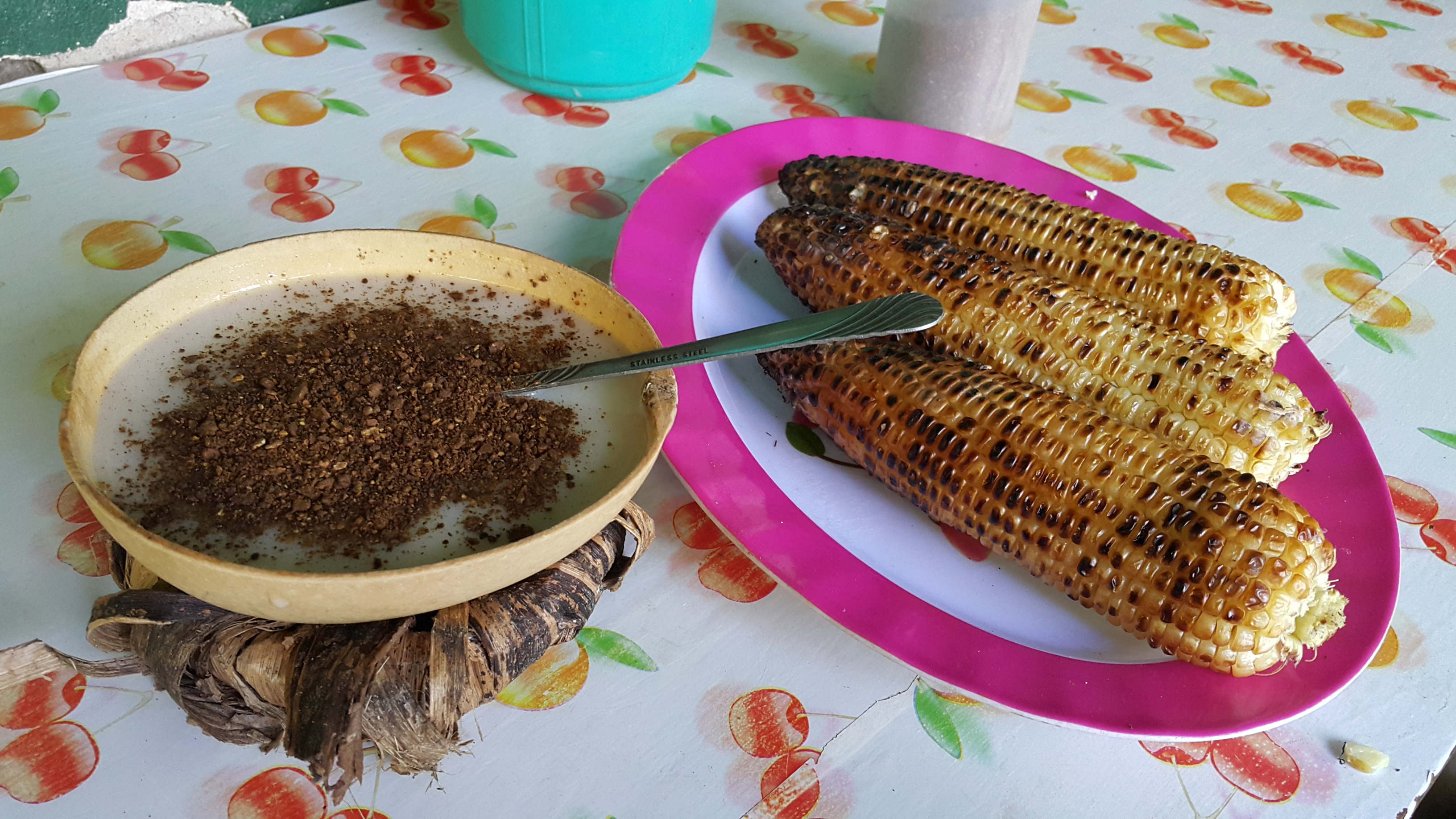 Atole agrio, atole chuco, atol agrio